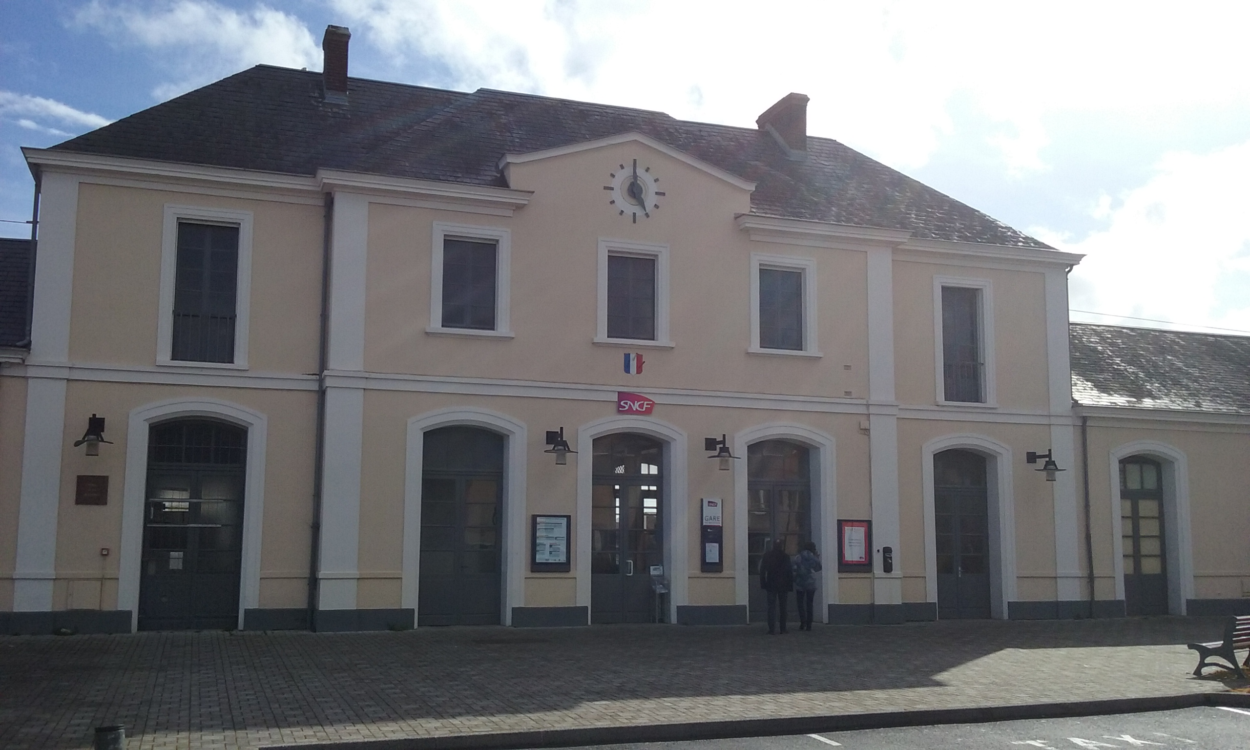 Façade du bâtiment voyageurs de la gare de Mézidon-Canon